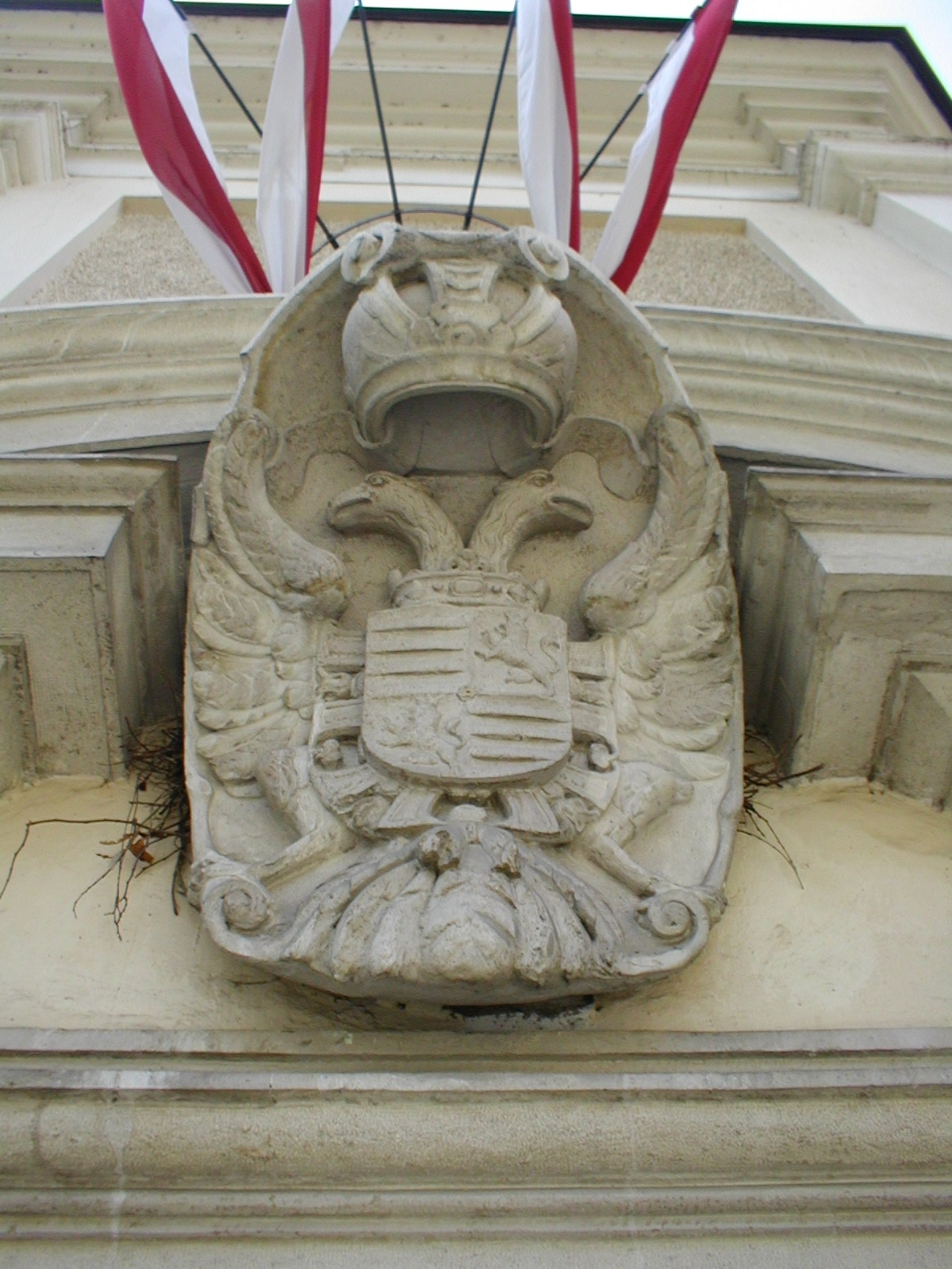 Fassadendetail kaiserliches Wappen an der Brigittakapelle in Wien